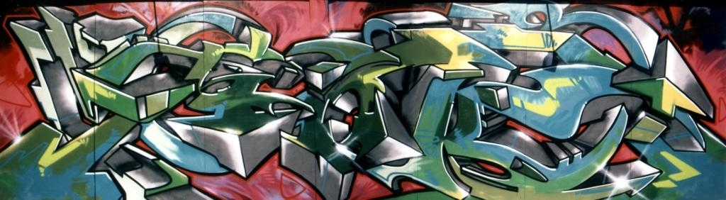 Réalisation d'une fresque sur panneaux bois au Gmac Allemand-1996